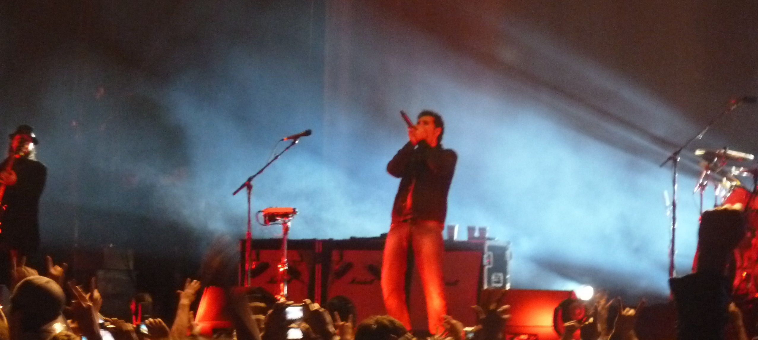 Estadio Bicentenario La Florida, 7 Octubre 2011. Videos en